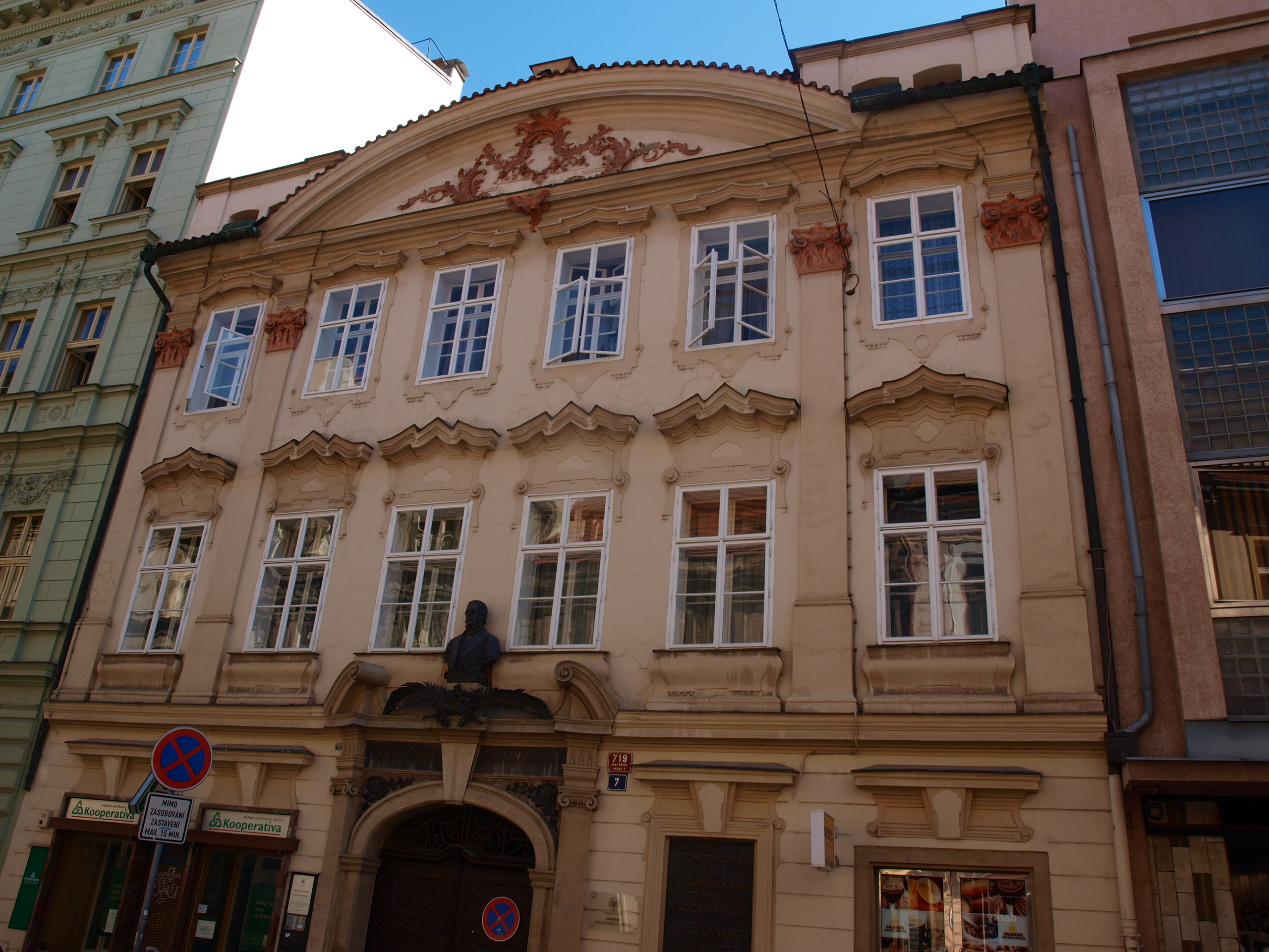 MacNevenův palác